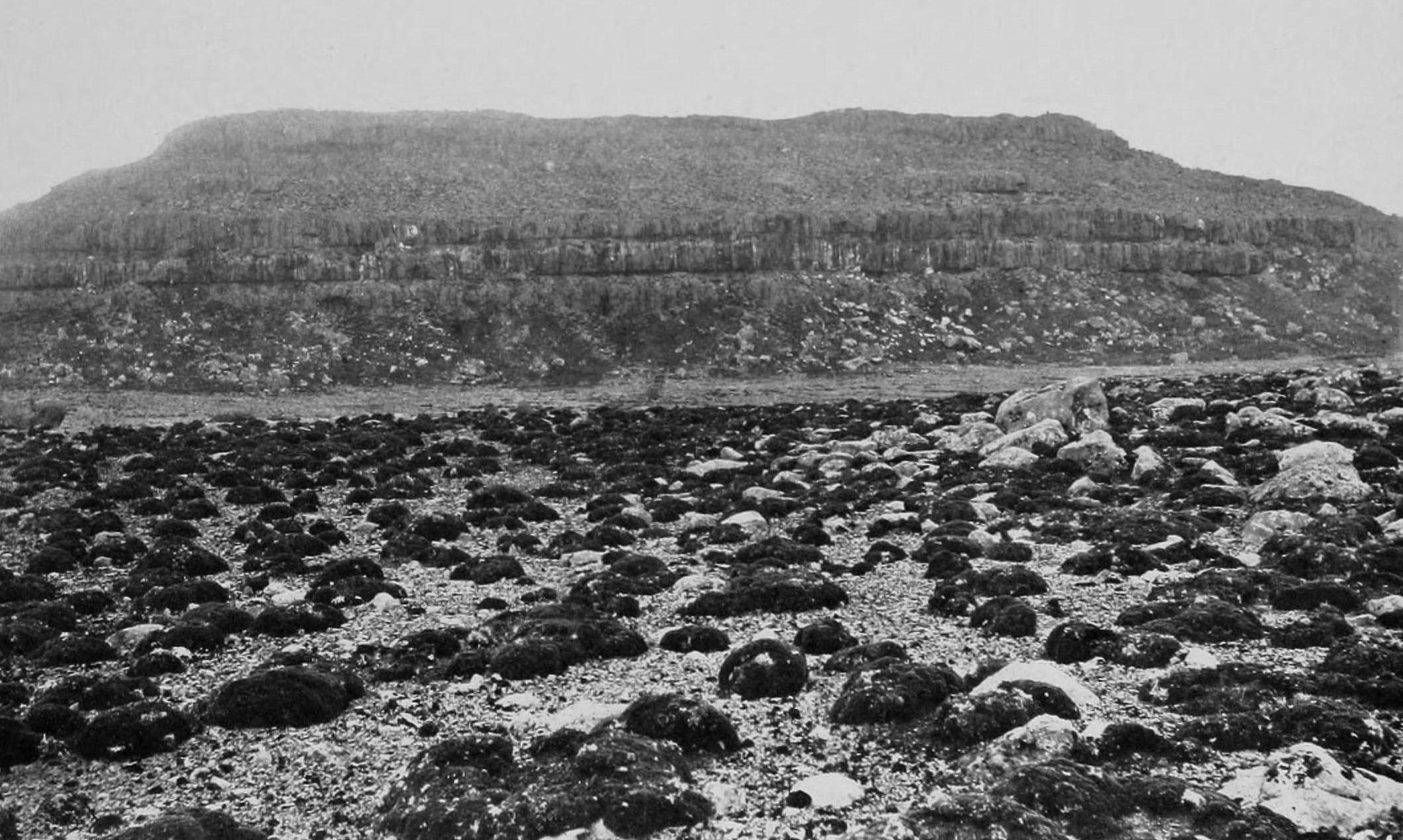 formation à coussins d'azorelle